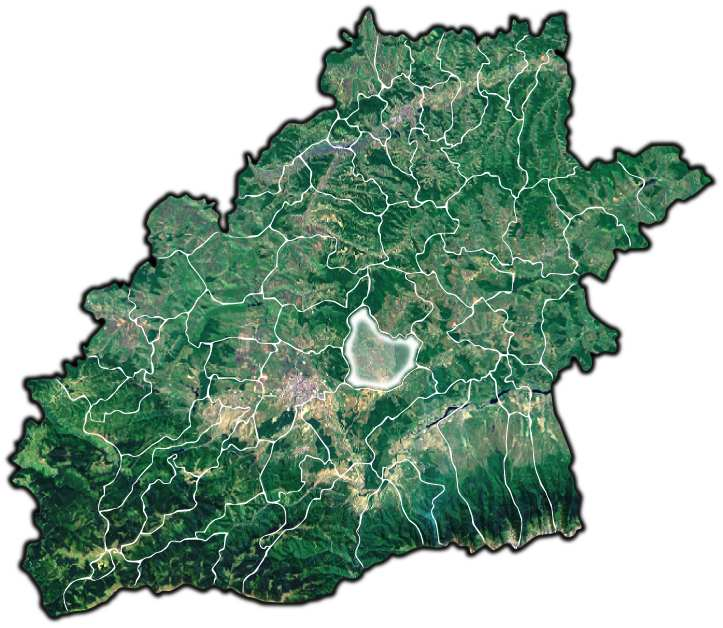 Rosia jud Sibiu